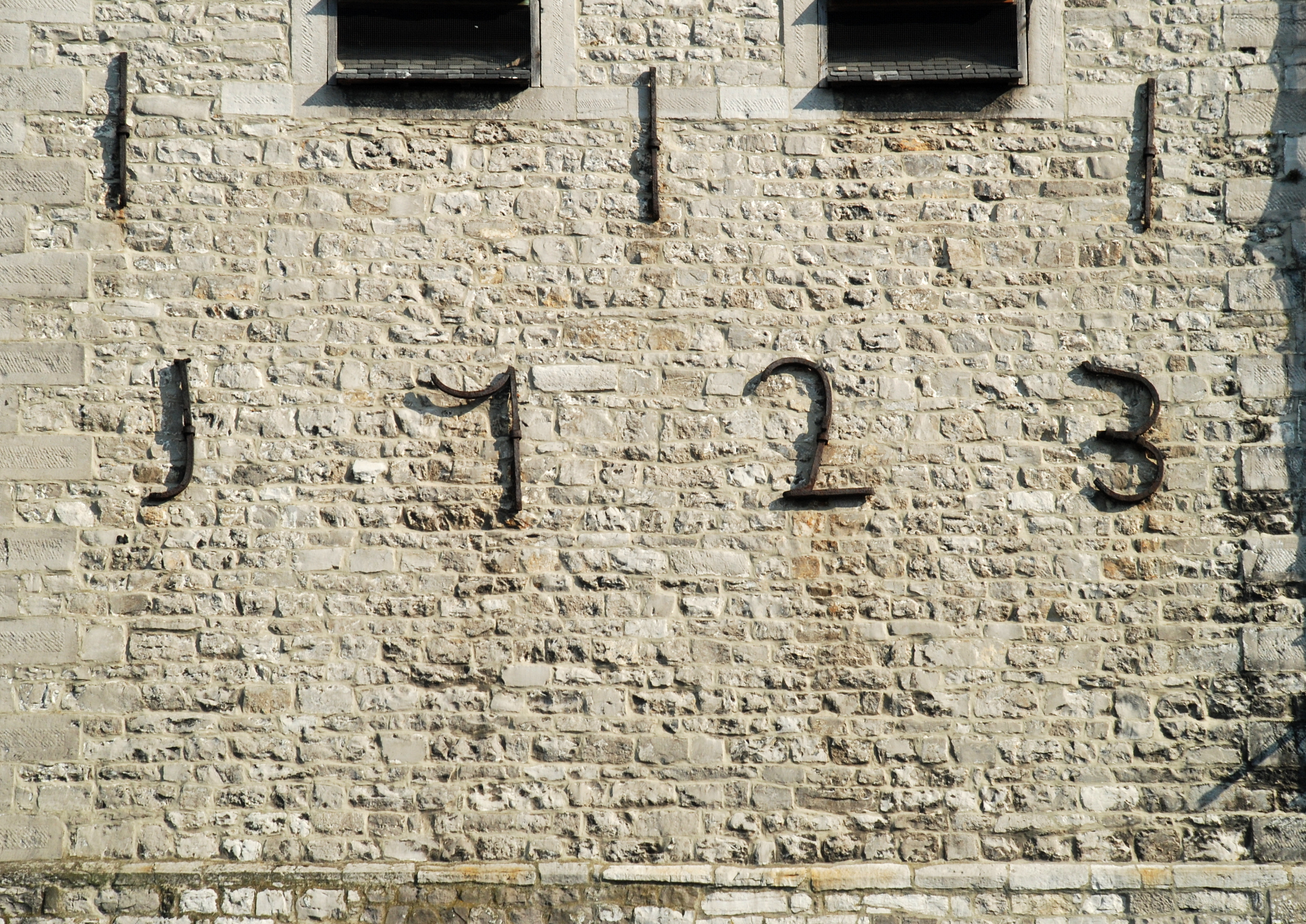 Belgique - Province de Namur - Église Saint-Maurice de Sclayn